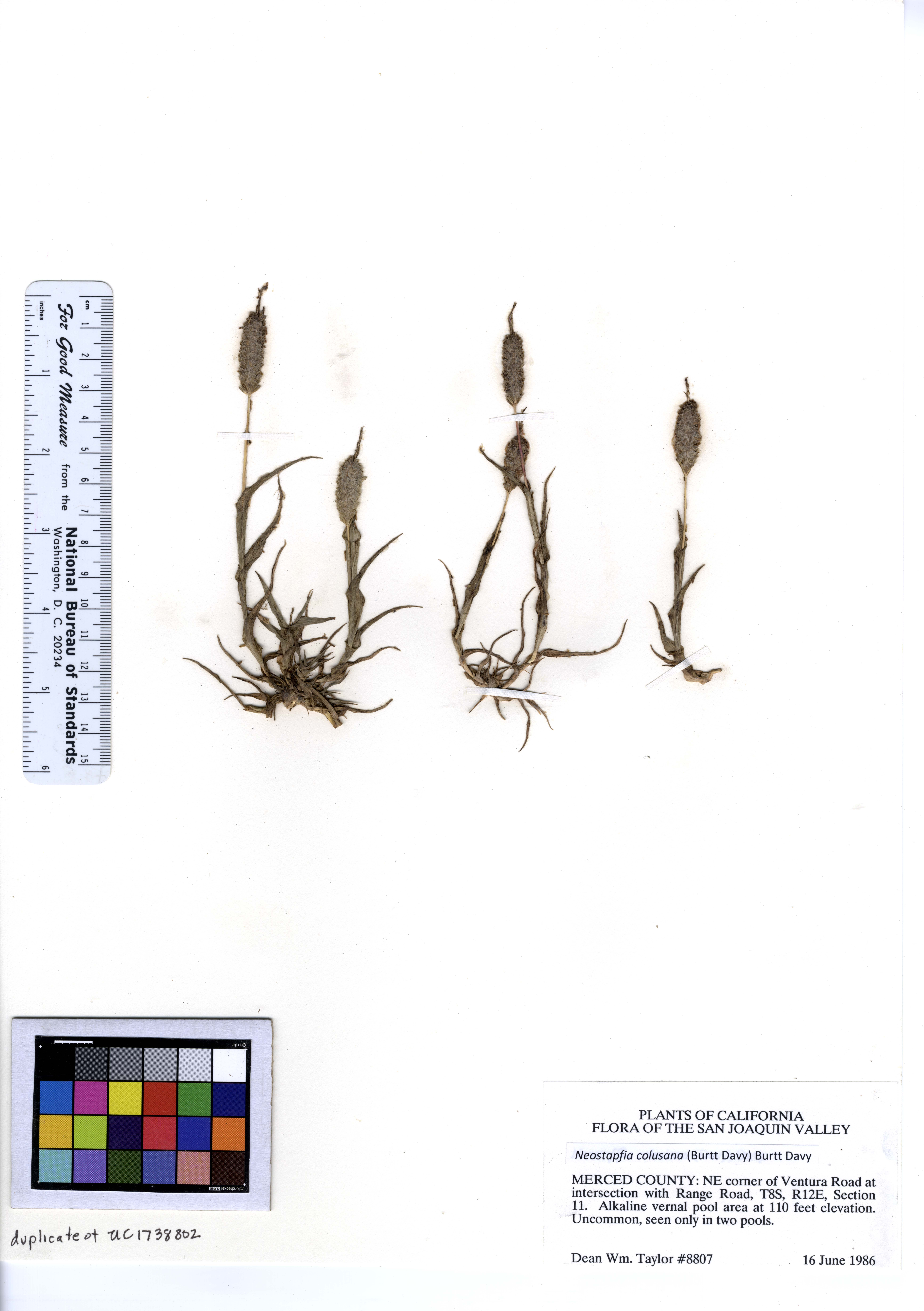 Neostapfia colusana dupl. of UC1738802